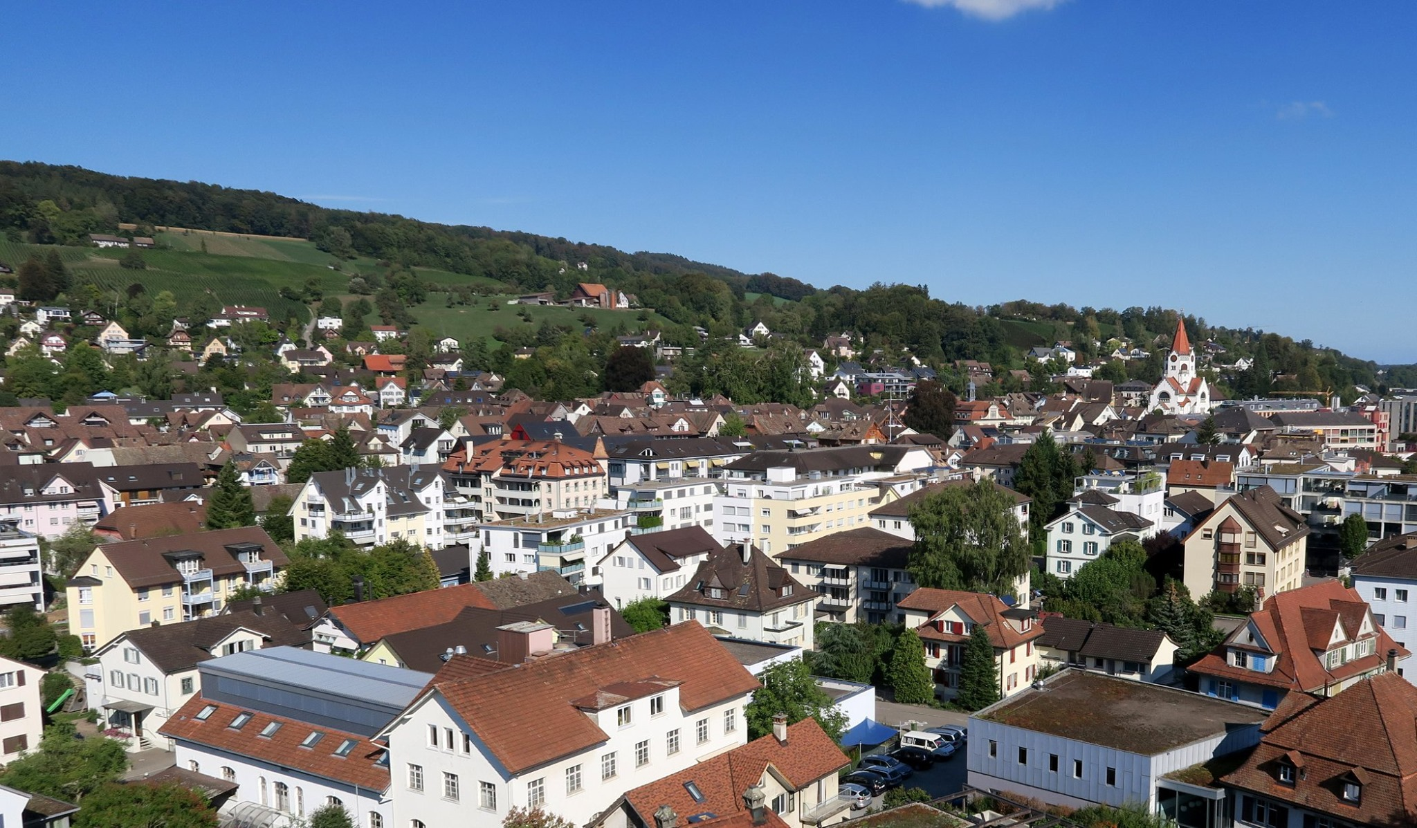 Altstadt von Weinfelden